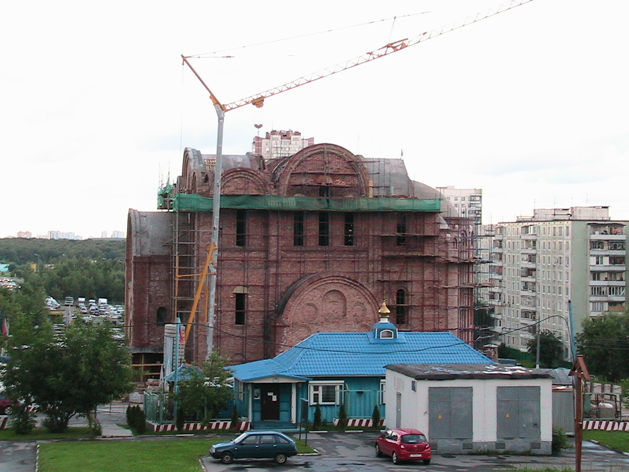 Храм Покрова Пресвятой Богородицы в Ясеневе (Москва). 17 июня 2010